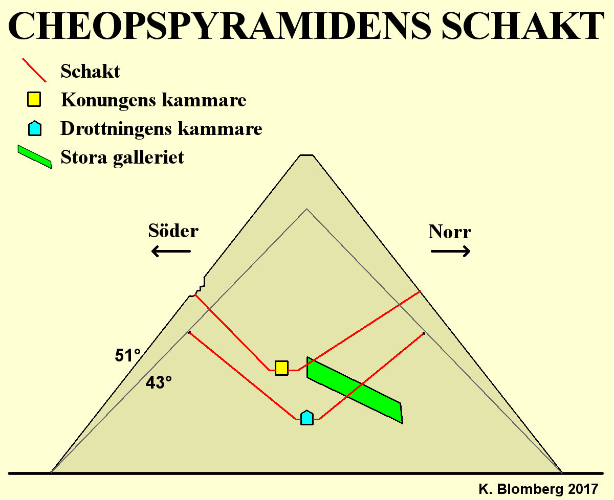 Översikt av Cheopspyramidens schakt och tänkbar temporär fasadvinkel